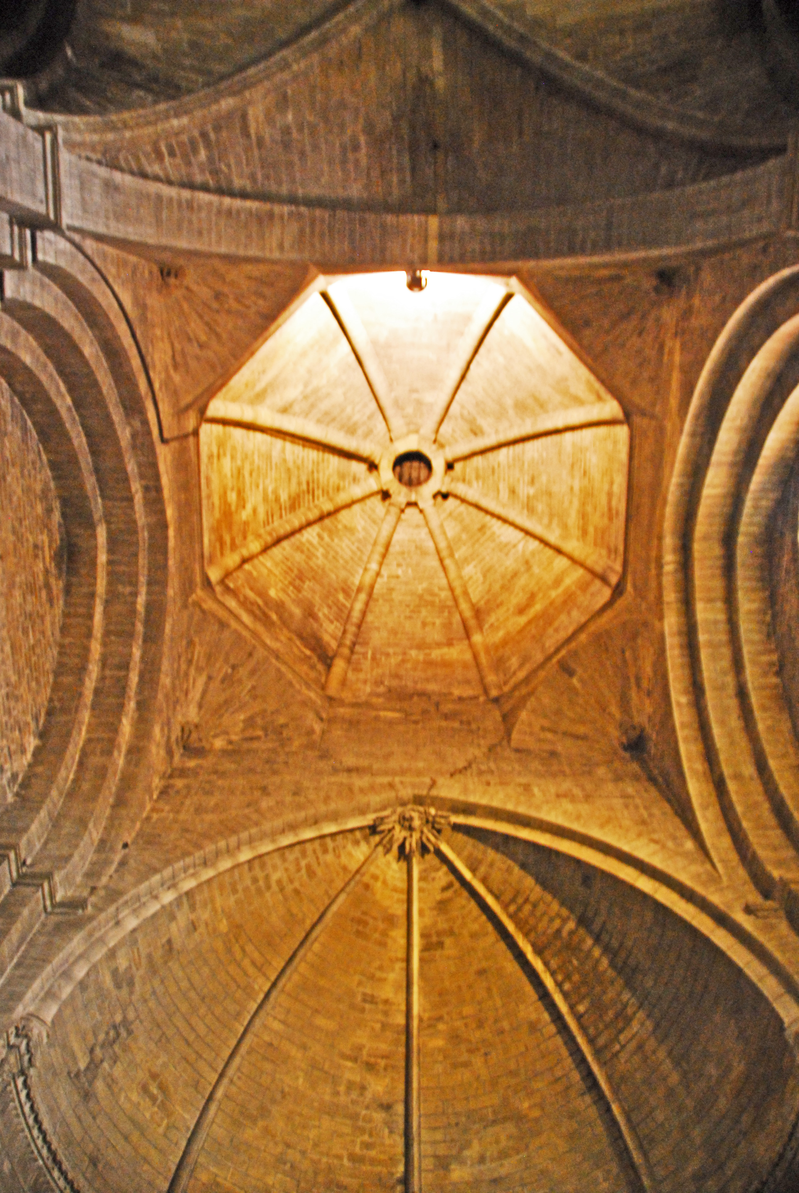 N-D-du-Lac du Le Thor, Vierung mit Trompenkuppel